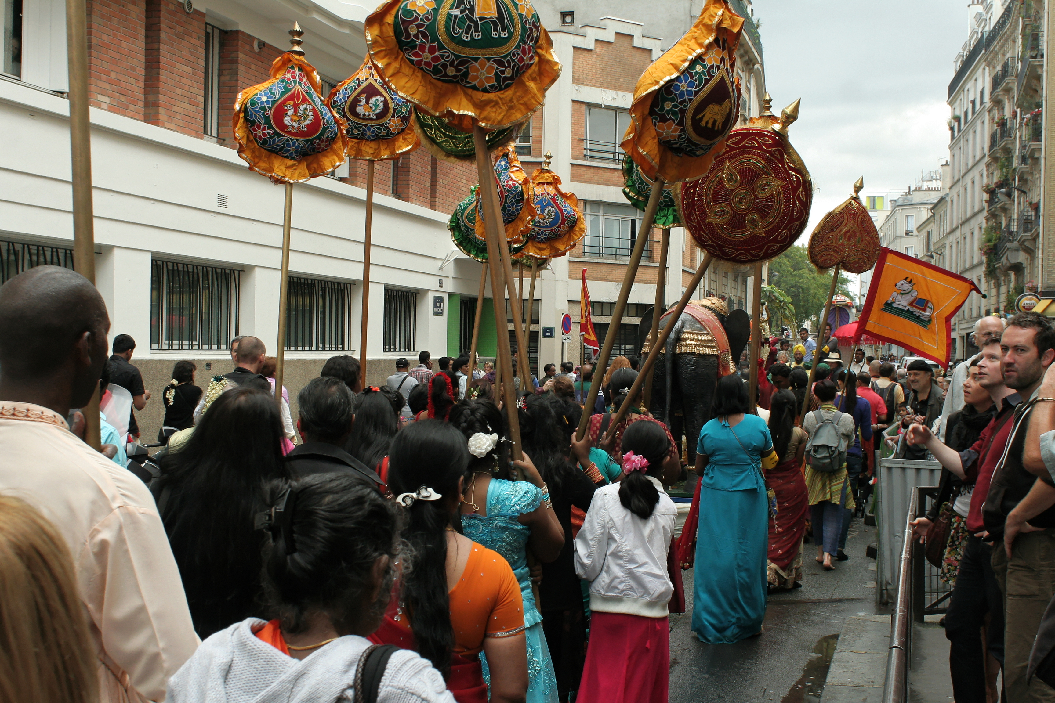 Paris, fête de Ganesh 2011. Porteurs d'oriflammes, derrière l'éléphant. Rue Marcadet.